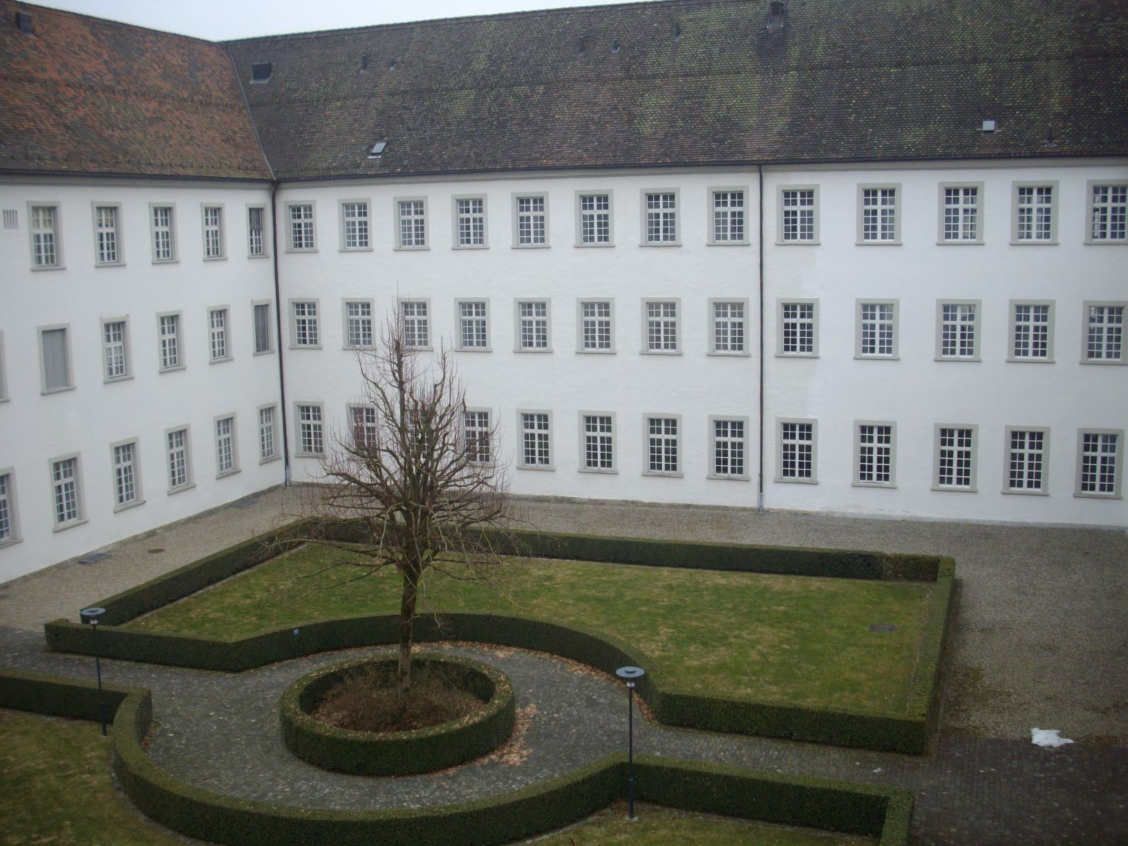 Kreuzgang im Kloster St. Urban (erneuert ab 1513)